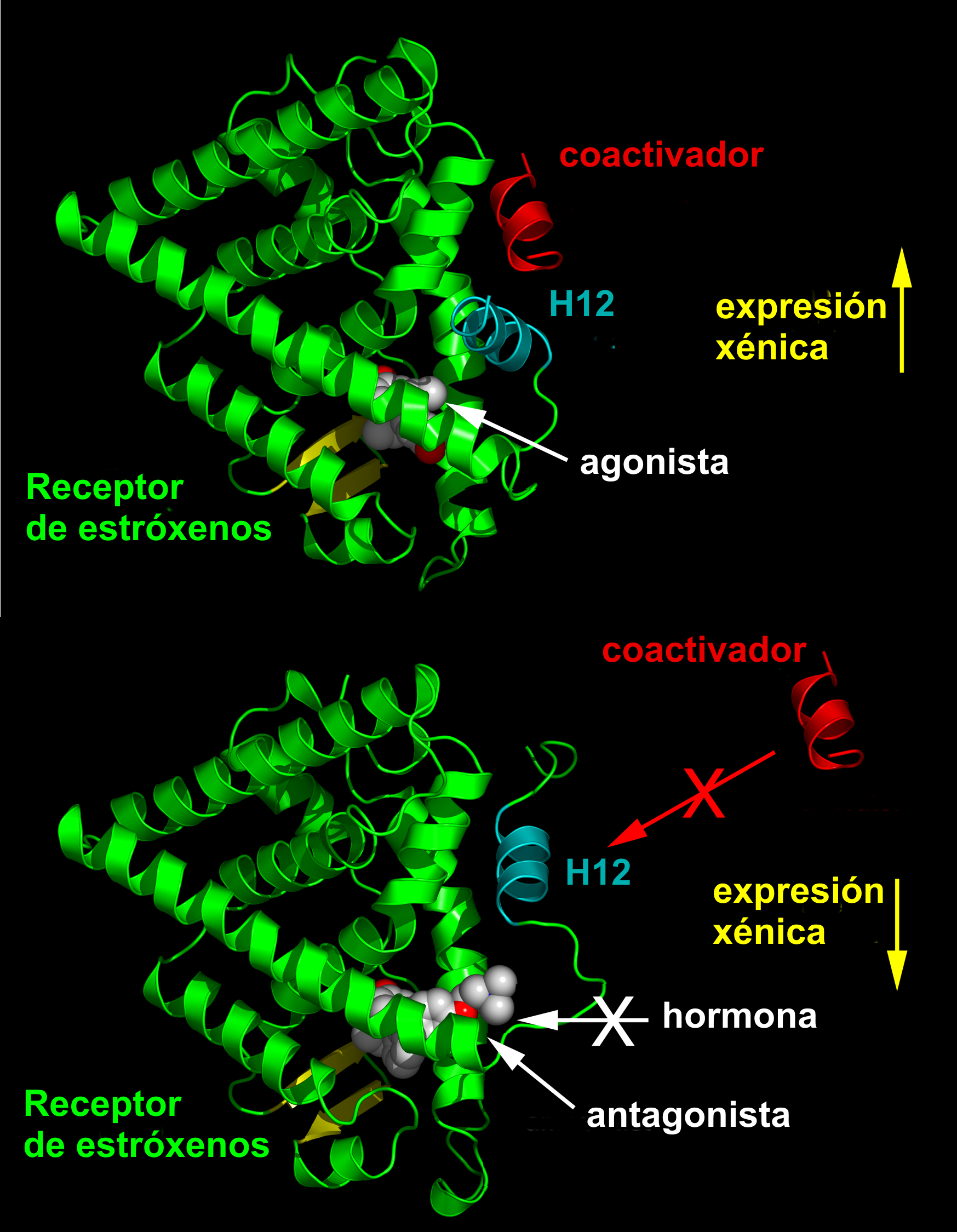 mecanismo dos receptores nucleares